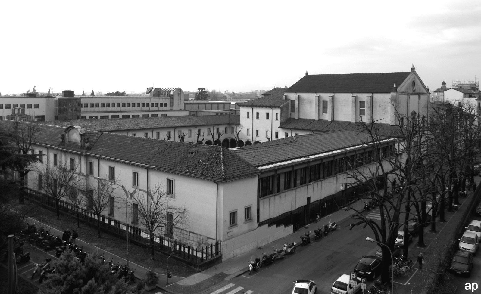 La biblioteca Frinzi e il chiostro di San Francesco visti dal palazzo di economia